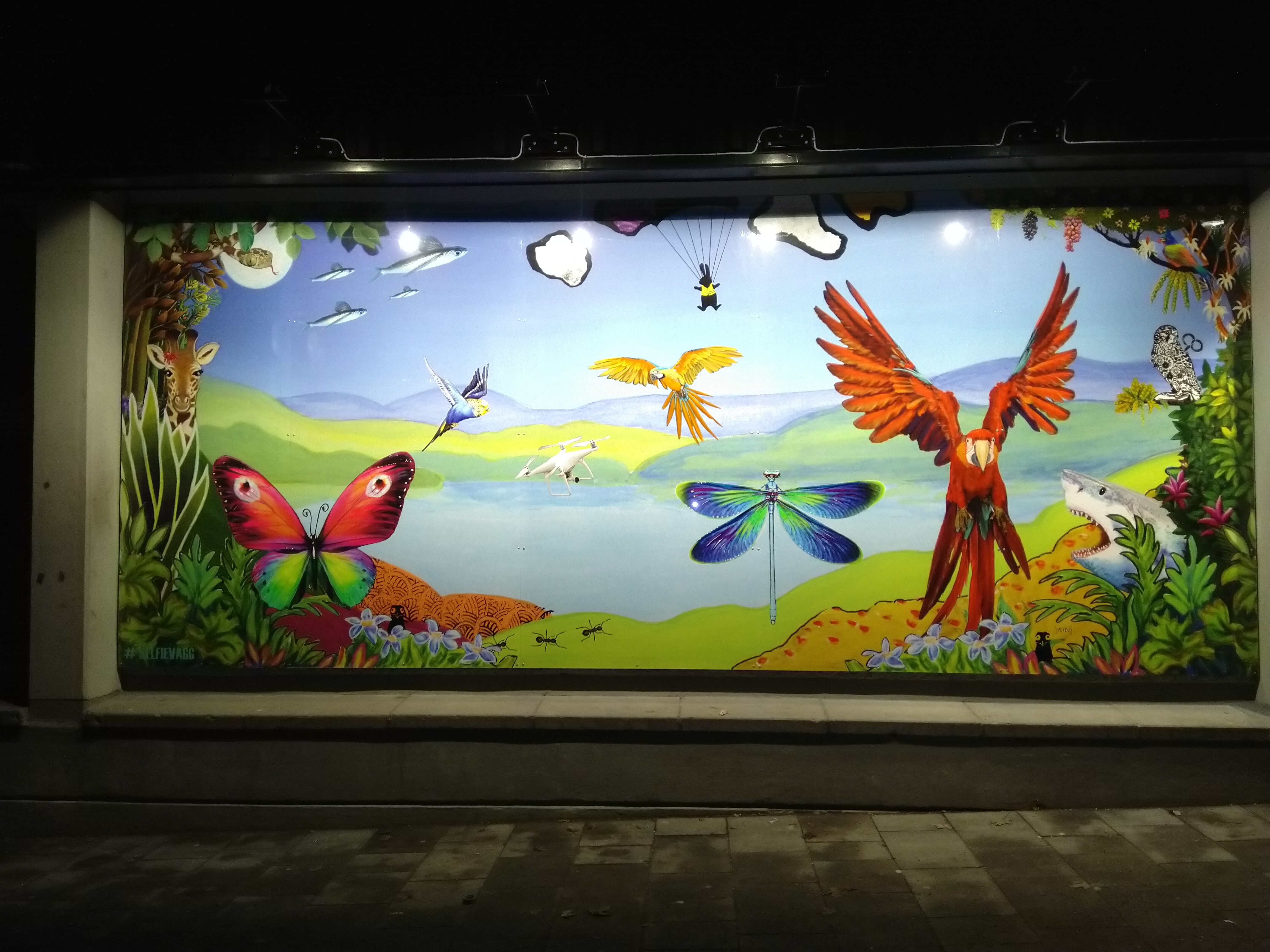 Av Catherine Giacomini och Frida Thofelt